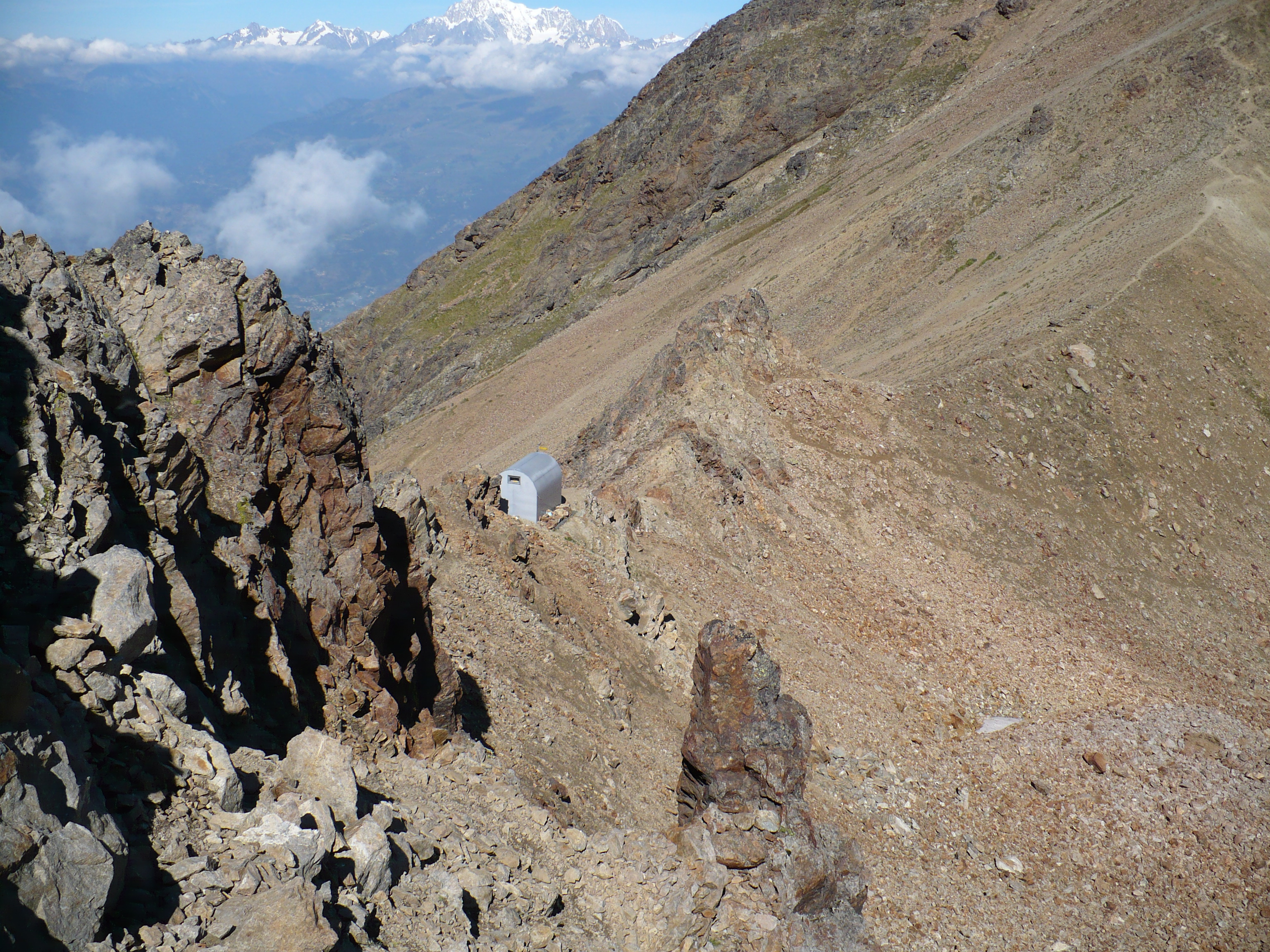 Inizio Ferrata Monte Emilius; in basso bivacco Federico Zullo - Aosta Valley - Grain Alps - Italy